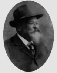 Guido Carocci